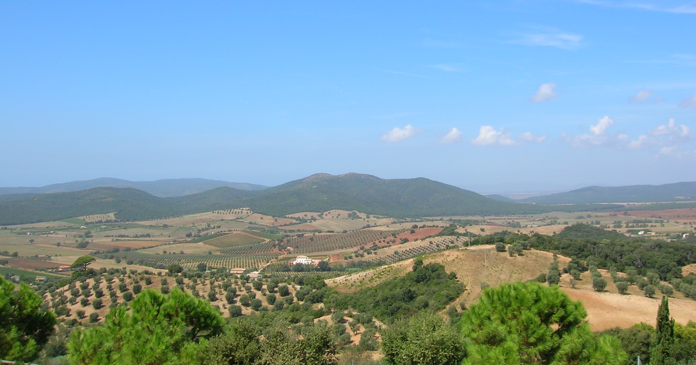 panorama da Capalbio, Toscana, Italia.